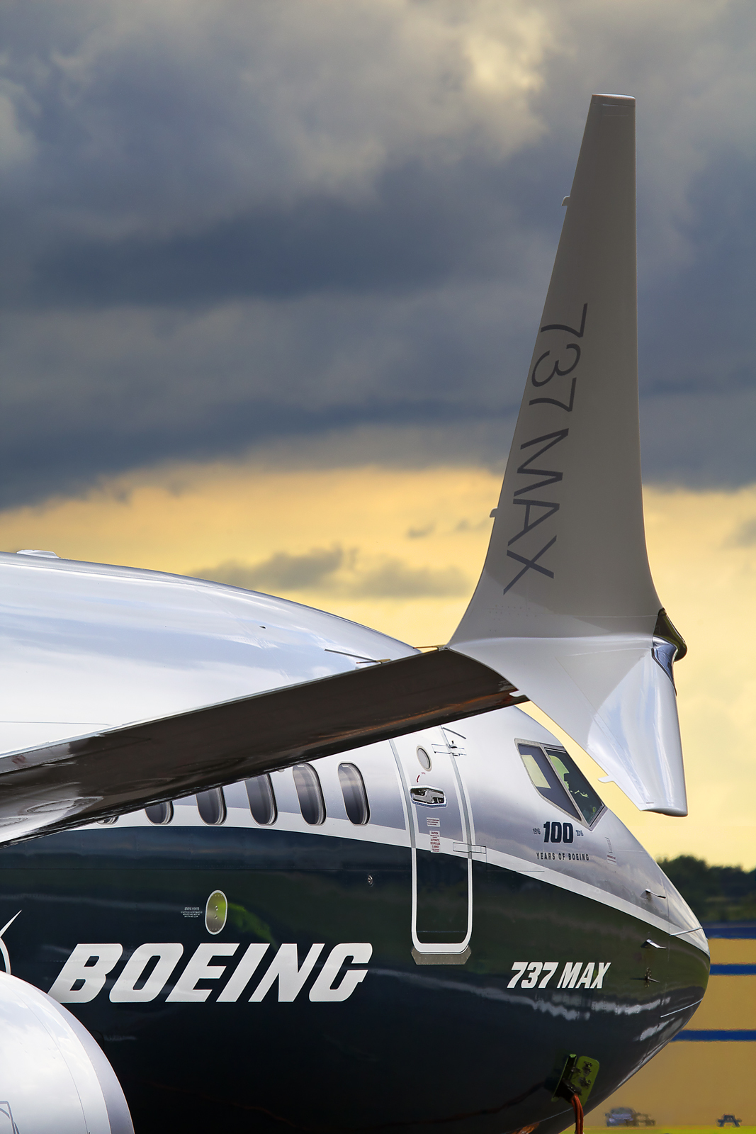 Boeing 737-8 MAX (N8704Q cn 36988/5788) at 2016 Farnborough Airshow (EGLF / FAB)